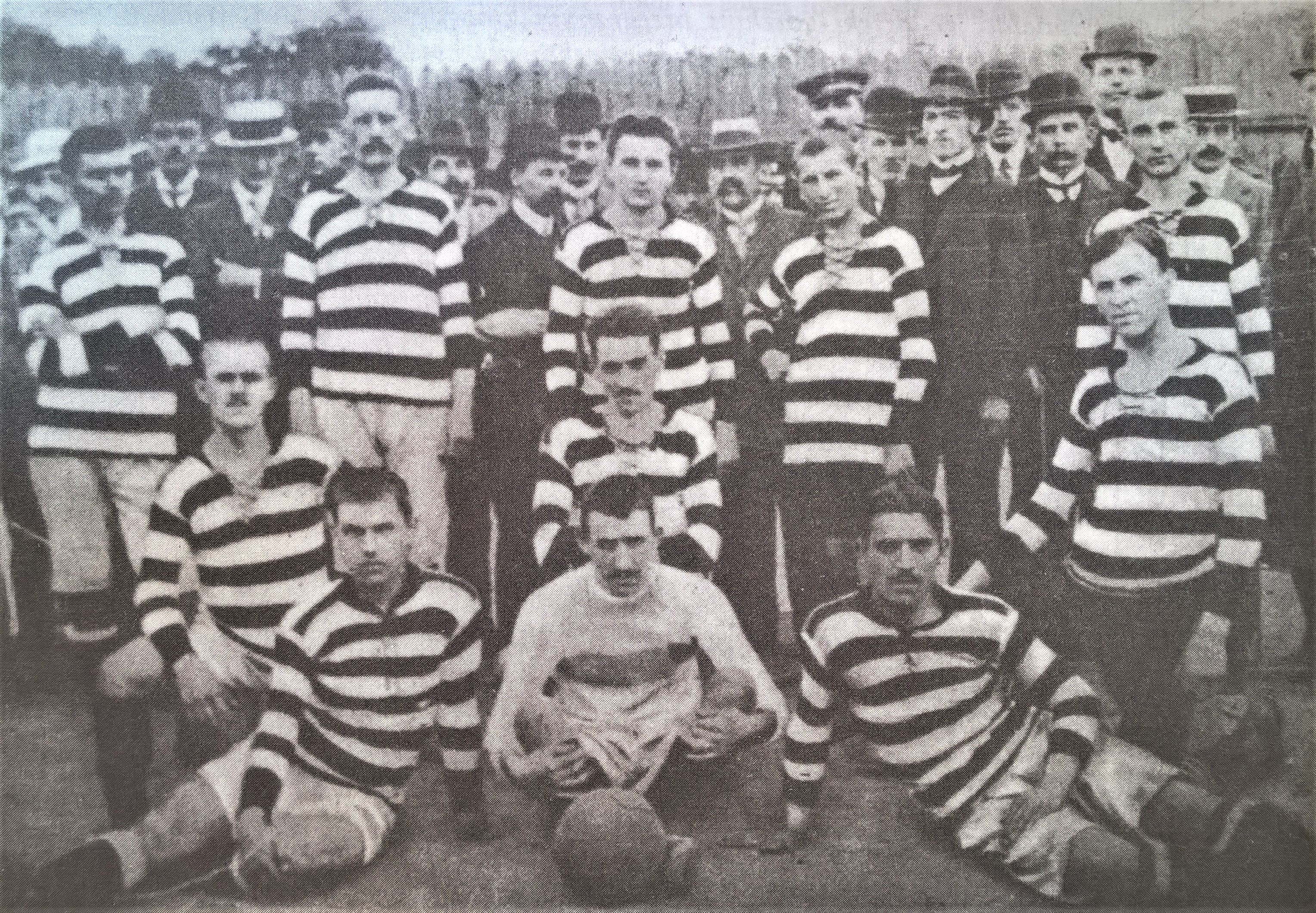 Drużyna piłkarska TMRF Widzew (w otoczeniu grupy działaczy i sympatyków) w 1911 roku. Stoją od lewej (w strojach sportowych): Jan Małecki, Franciszek Michalski, Zygmunt Hanke, Myszkorowski i Wincenty Tymowski. Klęczą od lewej: Willi Lichmaniak, Edward Krause i Edward Pol. Leżą od lewej: Triebe, bramkarz Smoley i kapitan zespołu Edward Zdziarski.